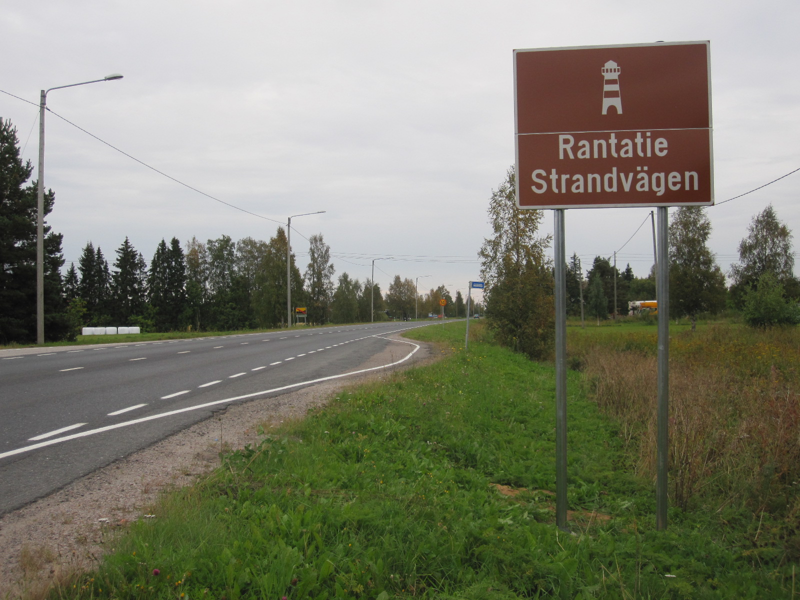 Liikenneviraston määrittelemä Pohjanmaan Rantatie-matkailutien opastekyltti seututiellä 847 (entisellä vanhalla nelostiellä) Kempeleen Riihivainiolla.